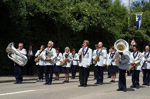 Kant. Musiktage 2004 in Arlesheim